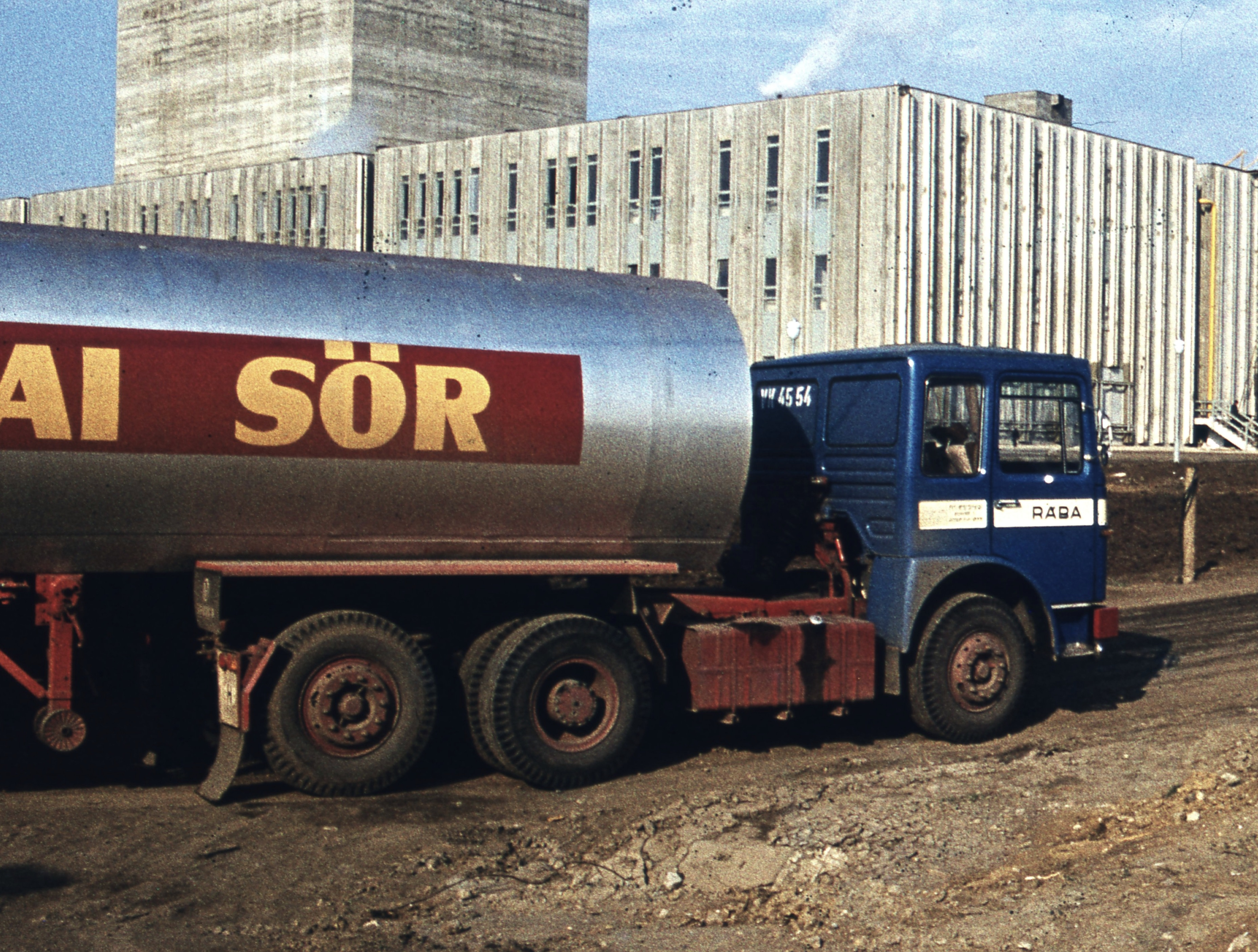 Borsodi Sörgyár. Location: Hungary, Bőcs Tags: Rába-brand, commercial vehicle, Hungarian brand, industrial building Title: Borsodi Sörgyár.